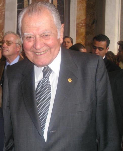 Fotografía obtenida por el Valo en Ciudad del Vaticano el 24 de octubre de 2005 con ocasión de la canonización de San Alberto Hurtado.